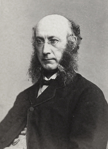 Portrait Robert Bentley